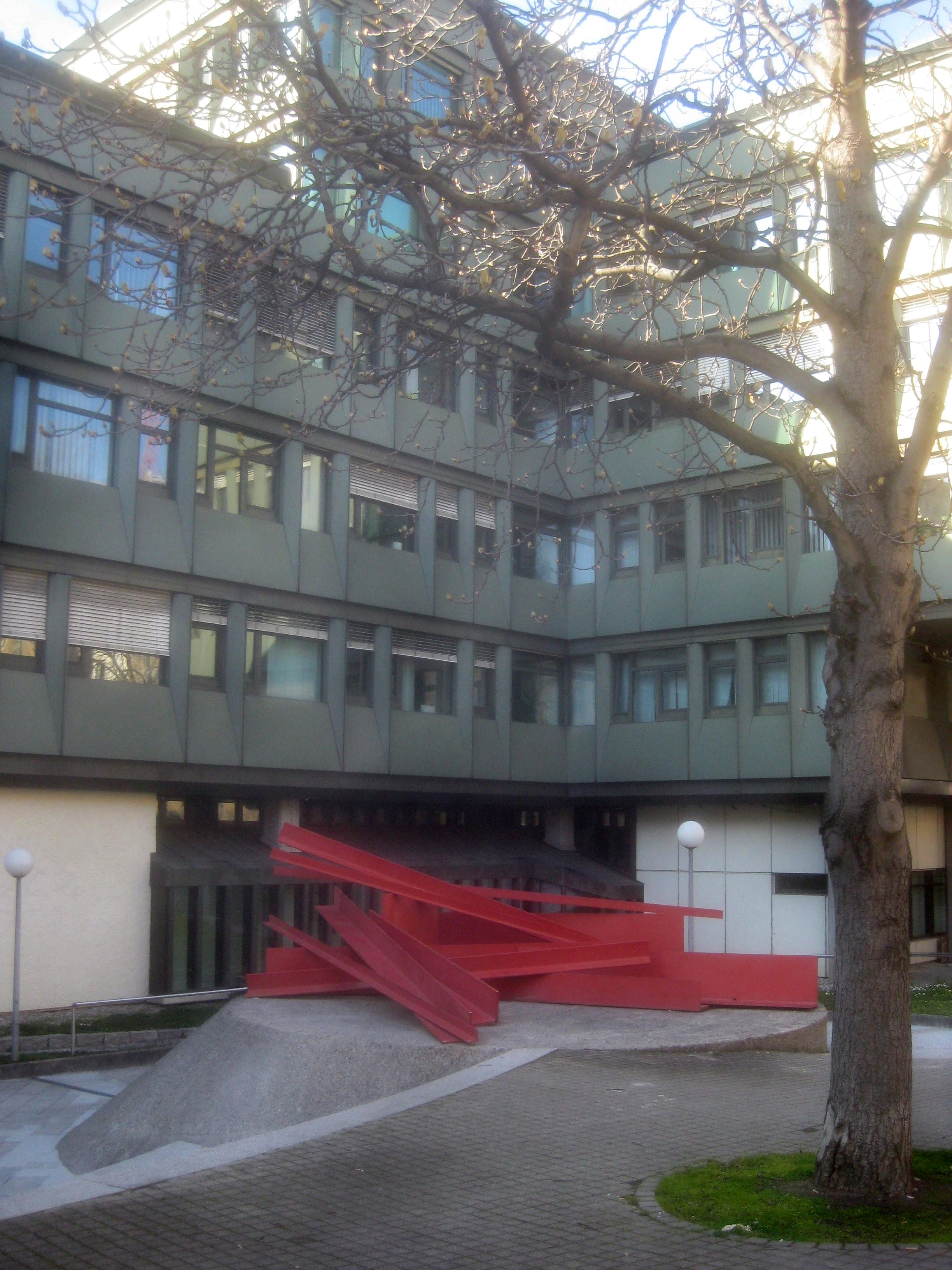 Oberlandesgericht Stuttgart, Fassade an der Olgastraße 2 mit der Skulptur "12 Kanten" von Christoph Freimann auf dem Eingangsplatz, 1981.